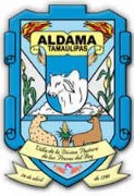 Escudo de Armas de Aldama Tamaulipas